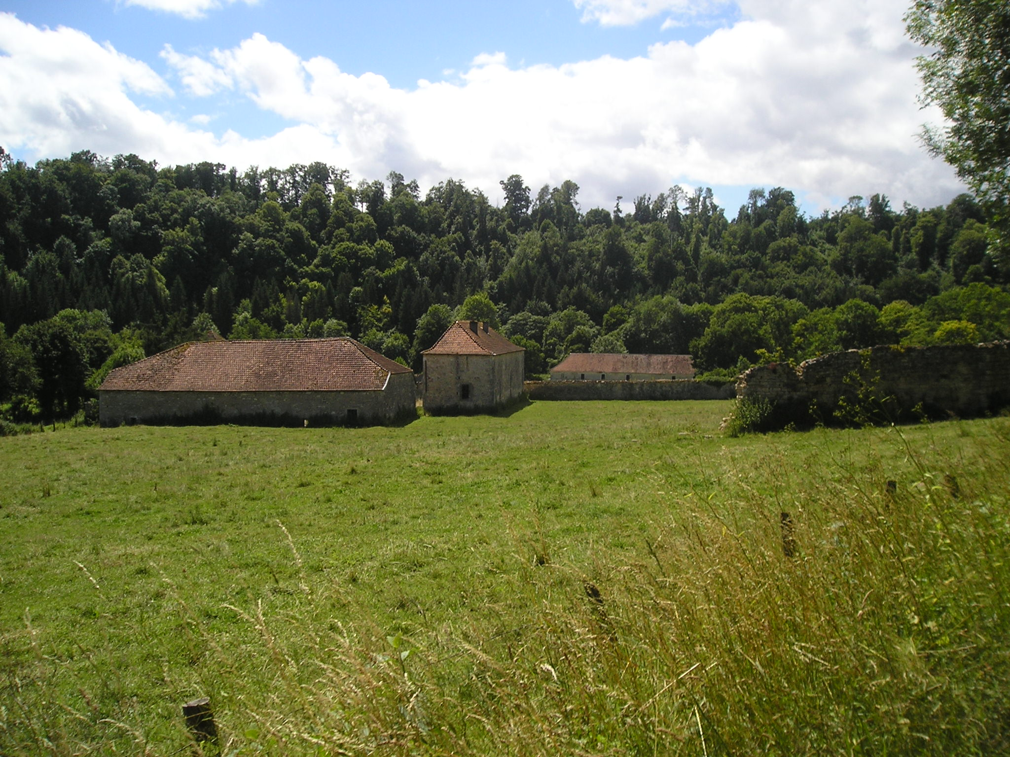 vue générale du site de l'abbaye de la Crête, à Bourdons-sur-Rognon, Haute-Marne (France)